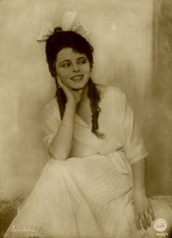 Porträt der Schauspielerin Manja Tzatschewa